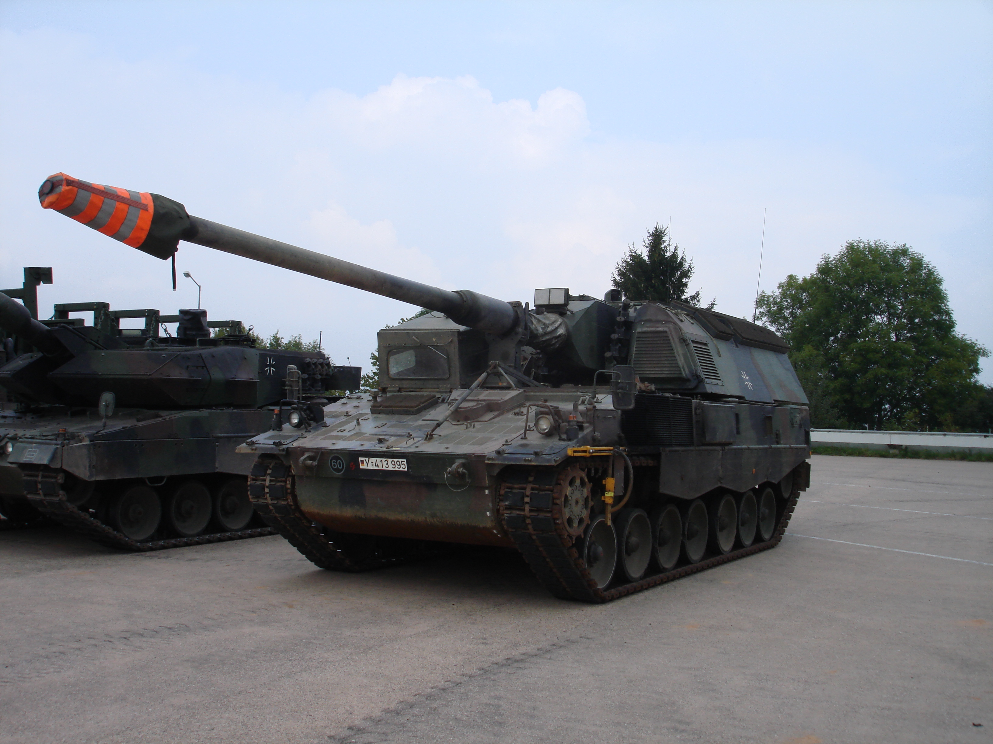 Panzerhaubitze 2000 der Wehrtechnische Dienststelle für Kraftfahrzeuge und Panzer (WTD 41) in Trier. Das Artilleriegeschütz dient für Fahrerprobungen.